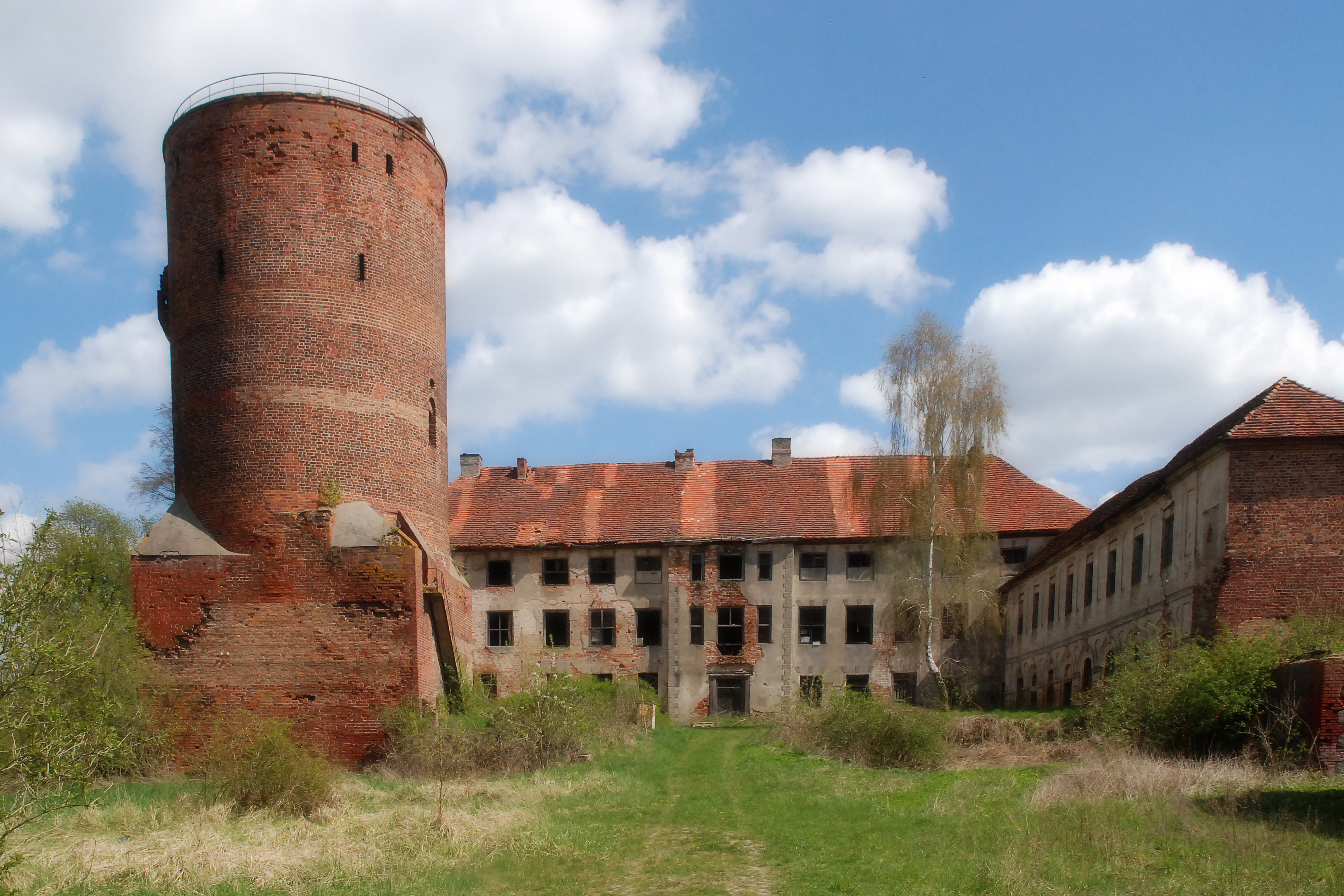 Swobnica zamek joannitów